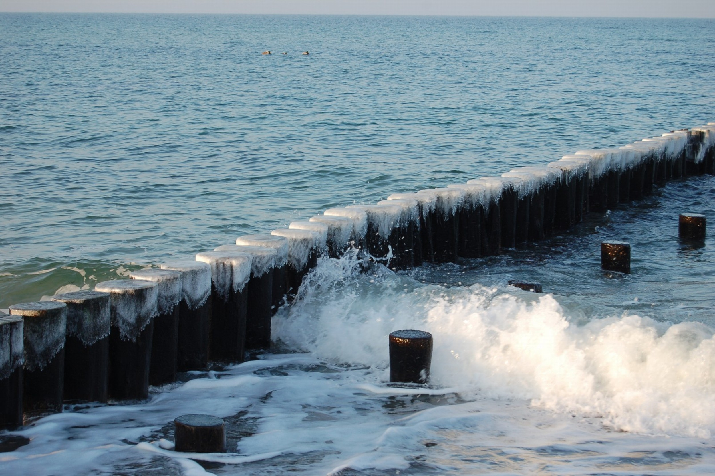 Eis an der Ostseeküste bei Heiligendamm